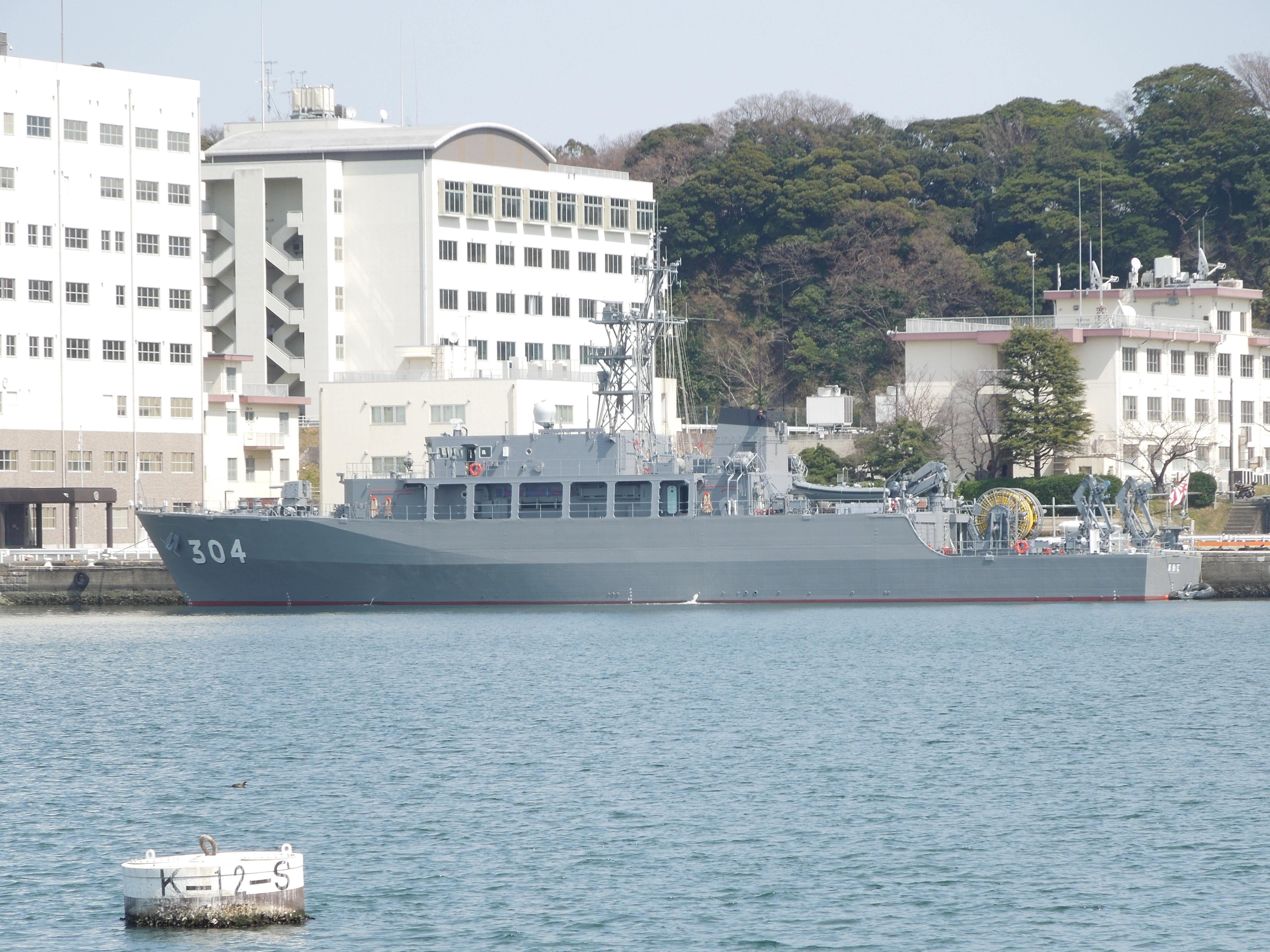 掃海艦「あわじ」